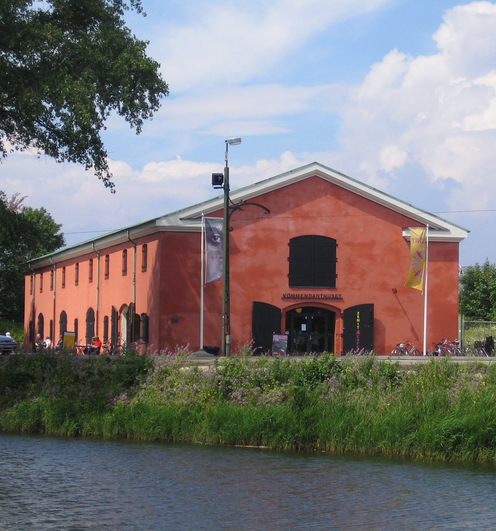 Kommendanthuset, museum in Malmö